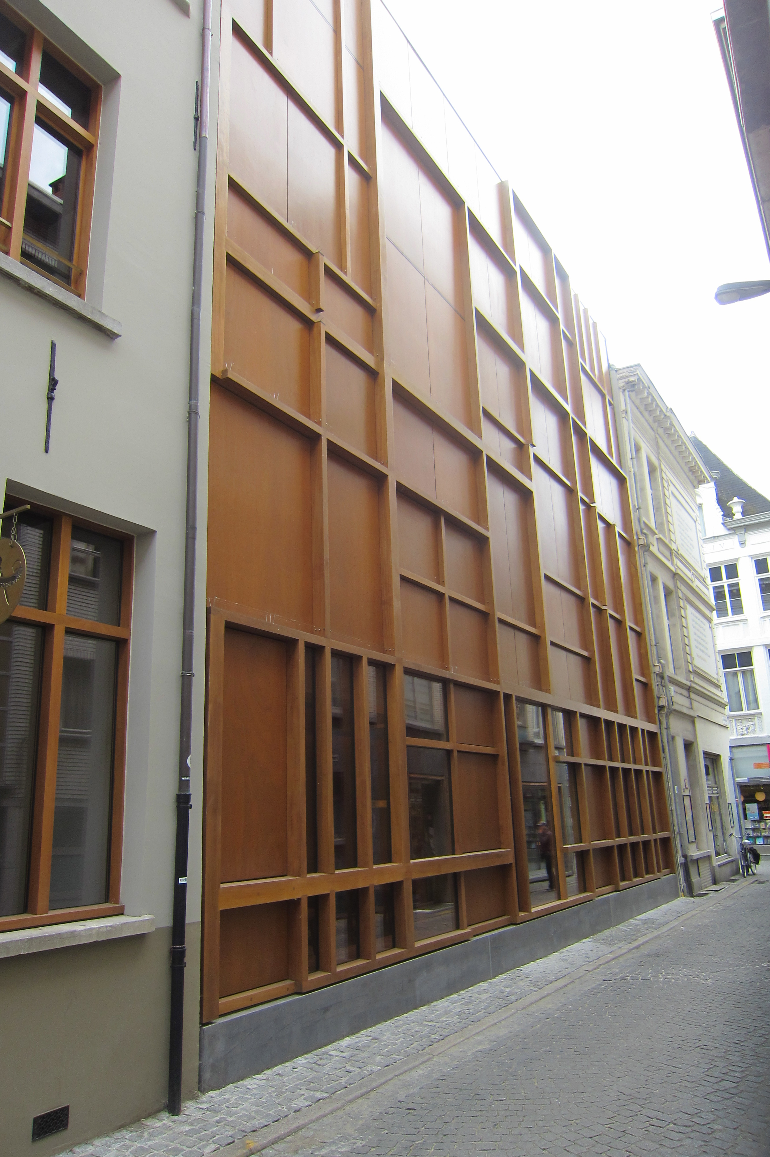 Gevel leeszaal Museum Plantin-Moretus aan de Heilige Geeststraat te Antwerpen